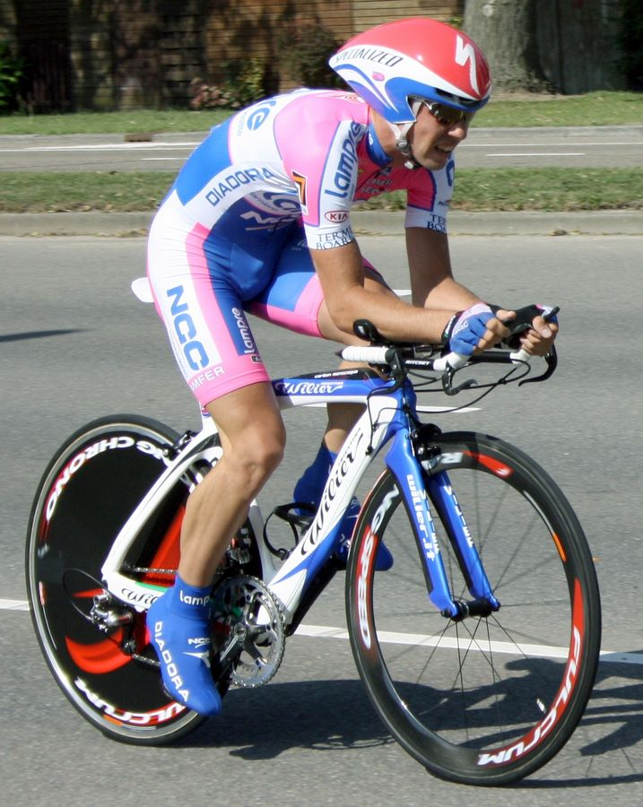 Francesco Gavazzi at the 2009 Eneco Tour prologue